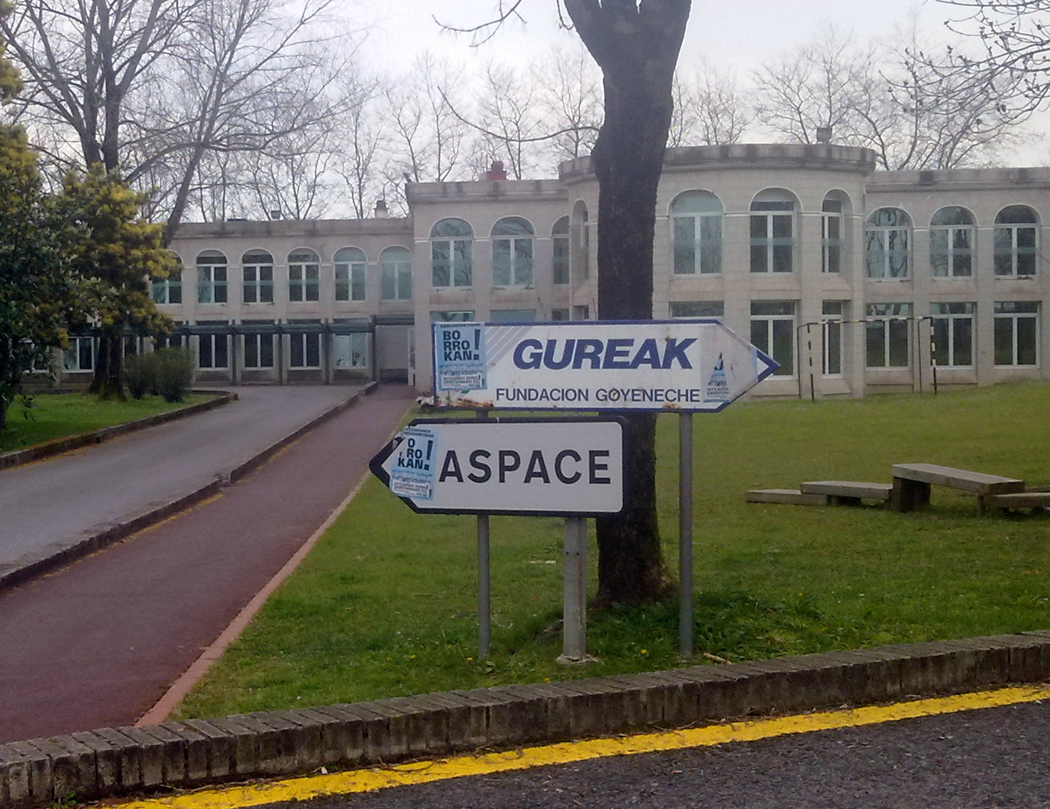 Aspaceko tailerrak